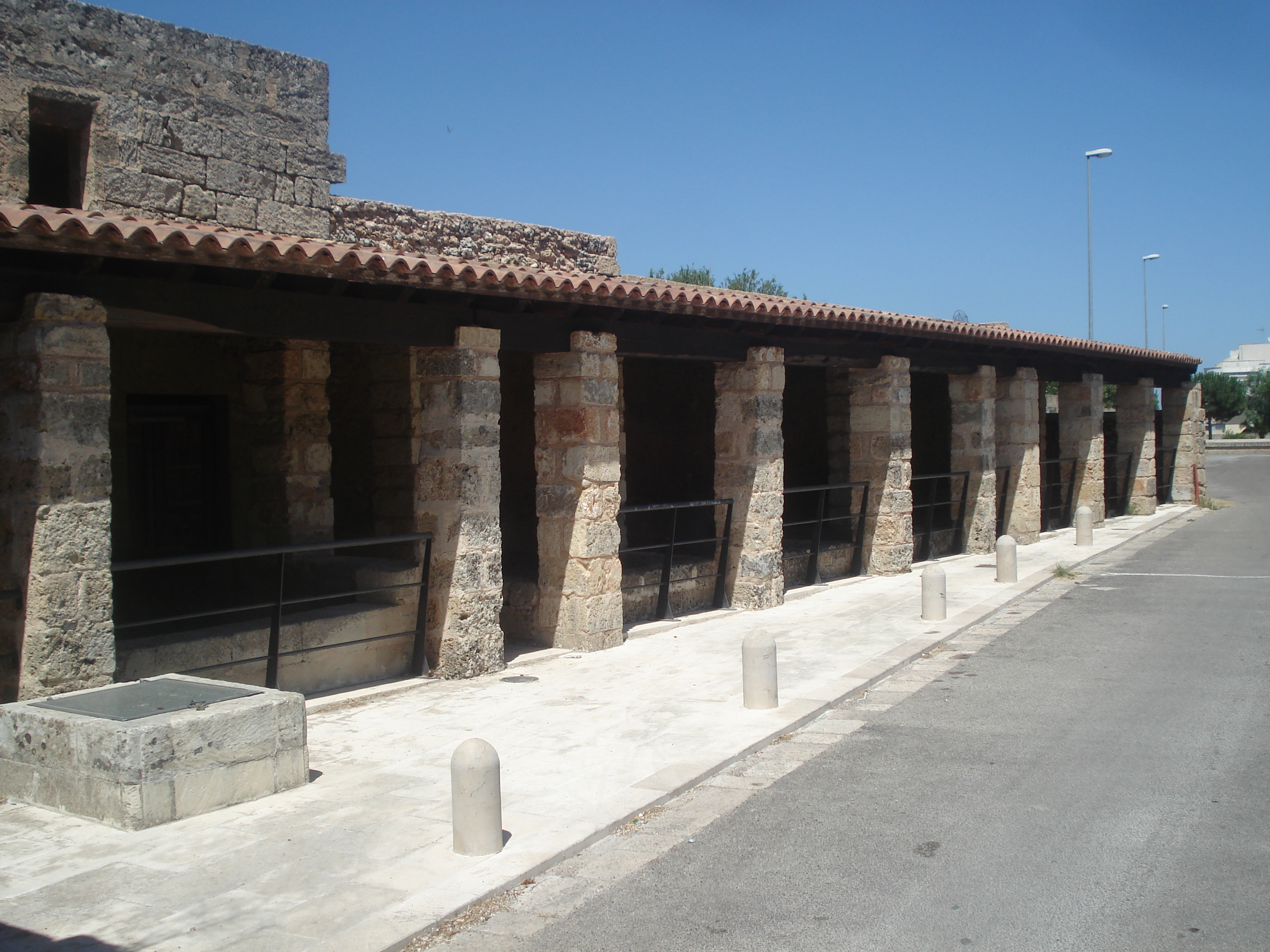 Palmenti a Montesano Salentino